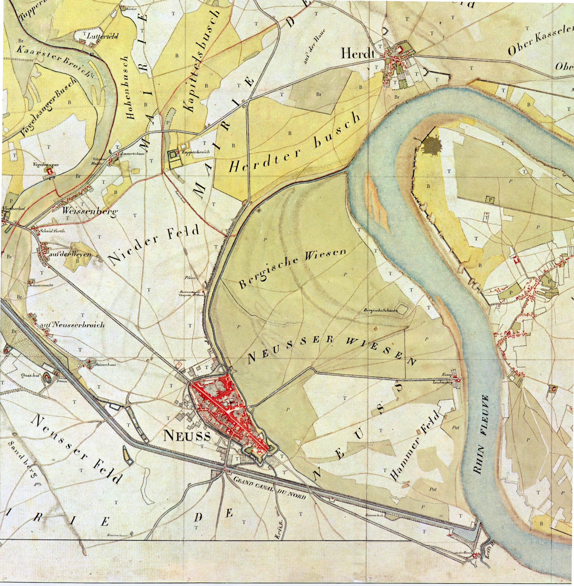 Aufnahme der rheinischen Gebiete durch französische Ingenieurgeographen unter Oberst Tranchot 1803-1813 und durch preußische Offiziere unter Generalmajor Freiherr von Müffling 1816-1820Blatt 44 - Düsseldorf, Ausschnitt Neuss